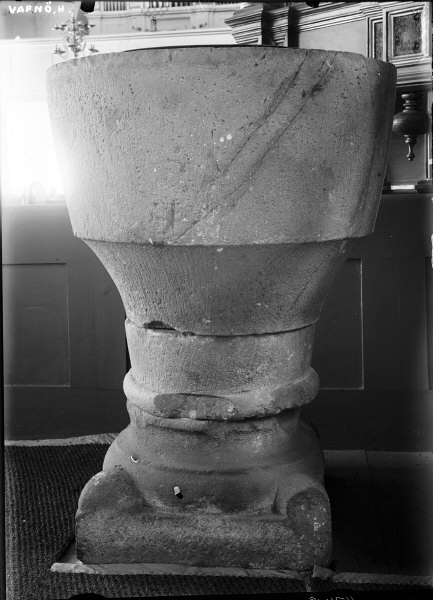 Medeltida dopfunt, snabbinv. Kategori: (04) DopfuntarMedeltida dopfunt, snabbinv.